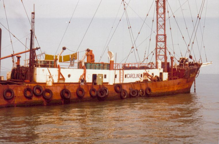 Foto genomen tijdens fanbezoek in sept.79. In maart 1980 is "the old lady" zoals ze werd genoemd gezonken.